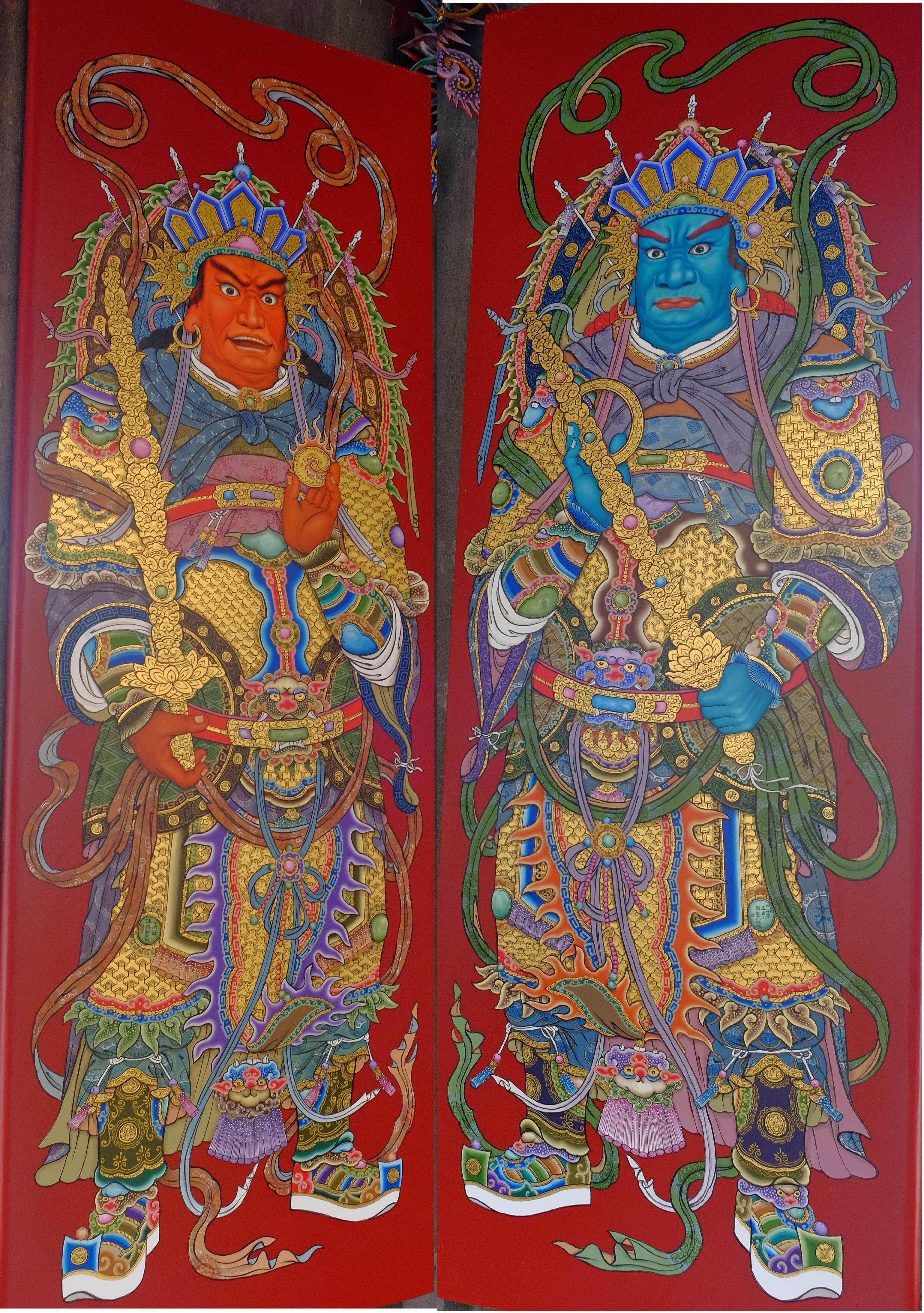 頂泰山巖門神